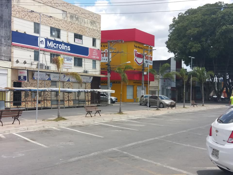 Centro Comercial de Cruz das Almas